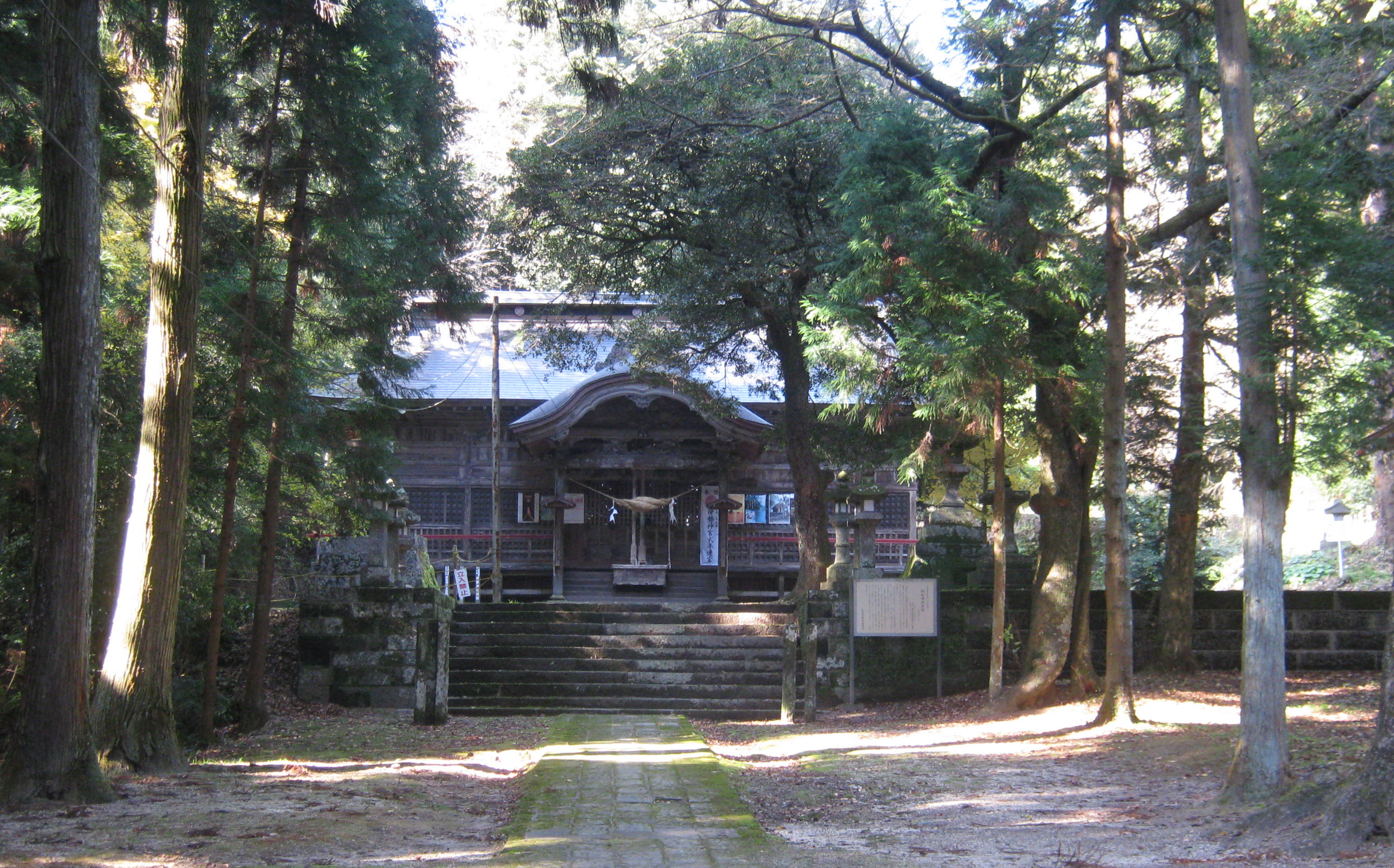 桙衝神社拝殿